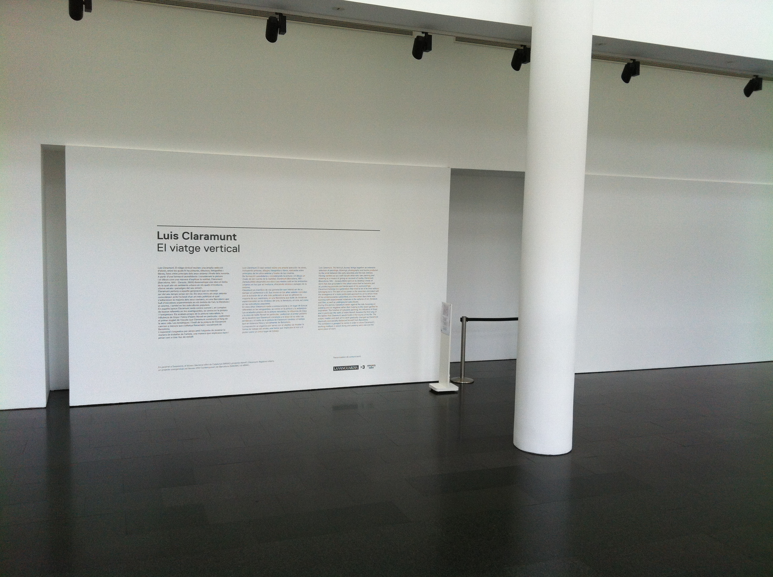 Lluis Claramunt exhibit at MACBA Barcelona